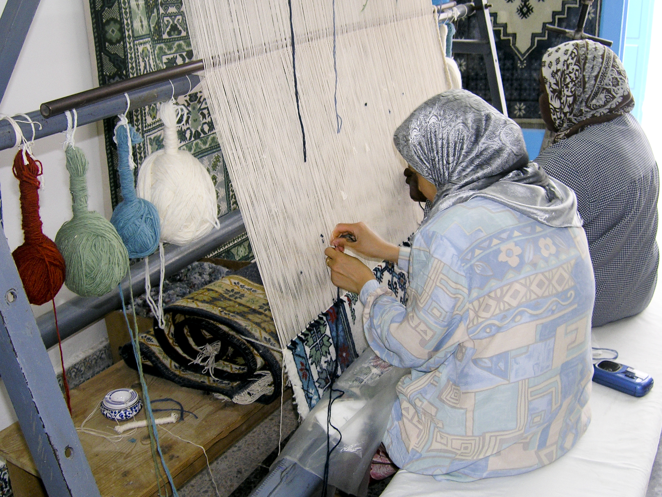 Djerba. Tunisia